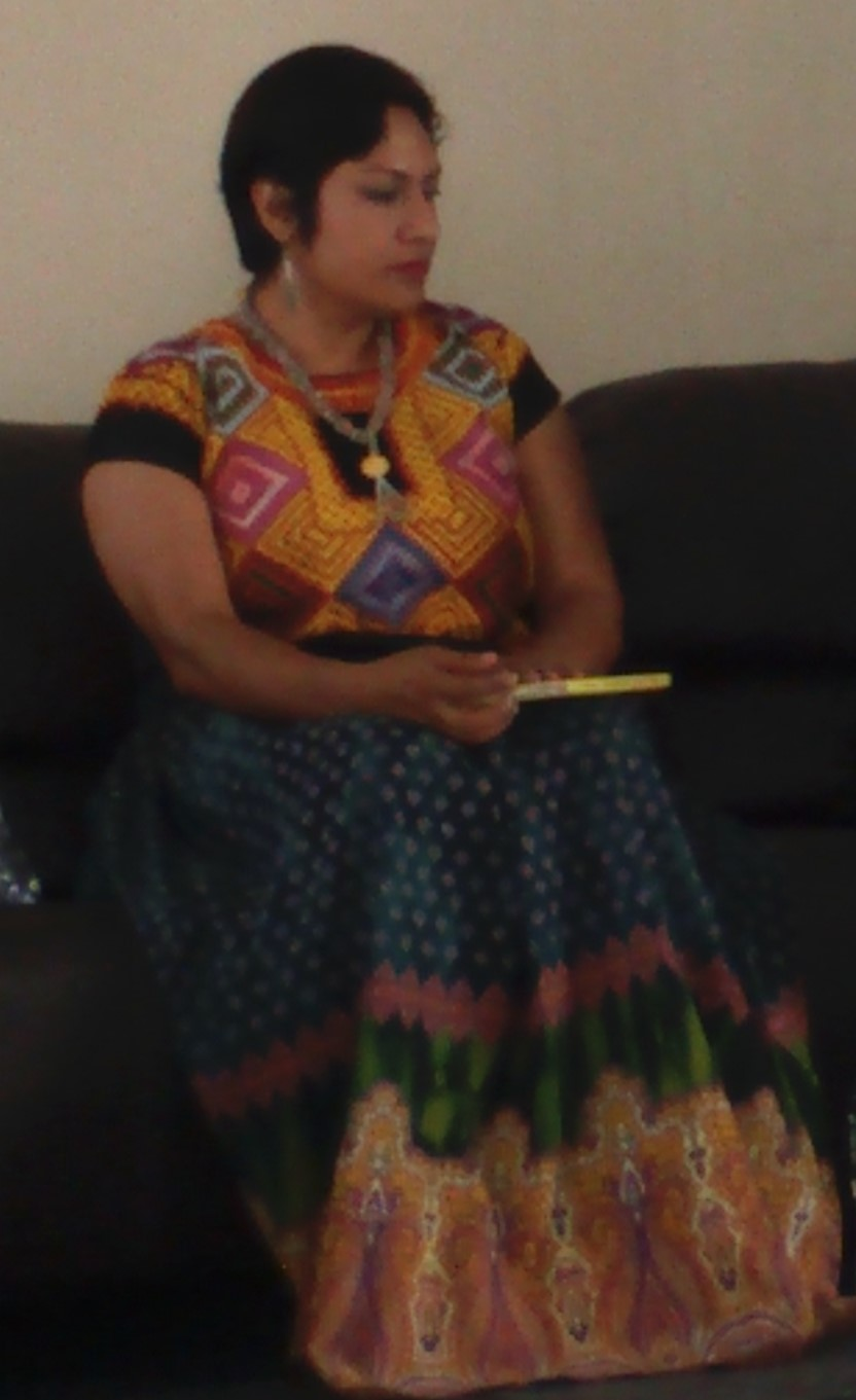 Irma Pineda Santiago (Poeta zapoteca)